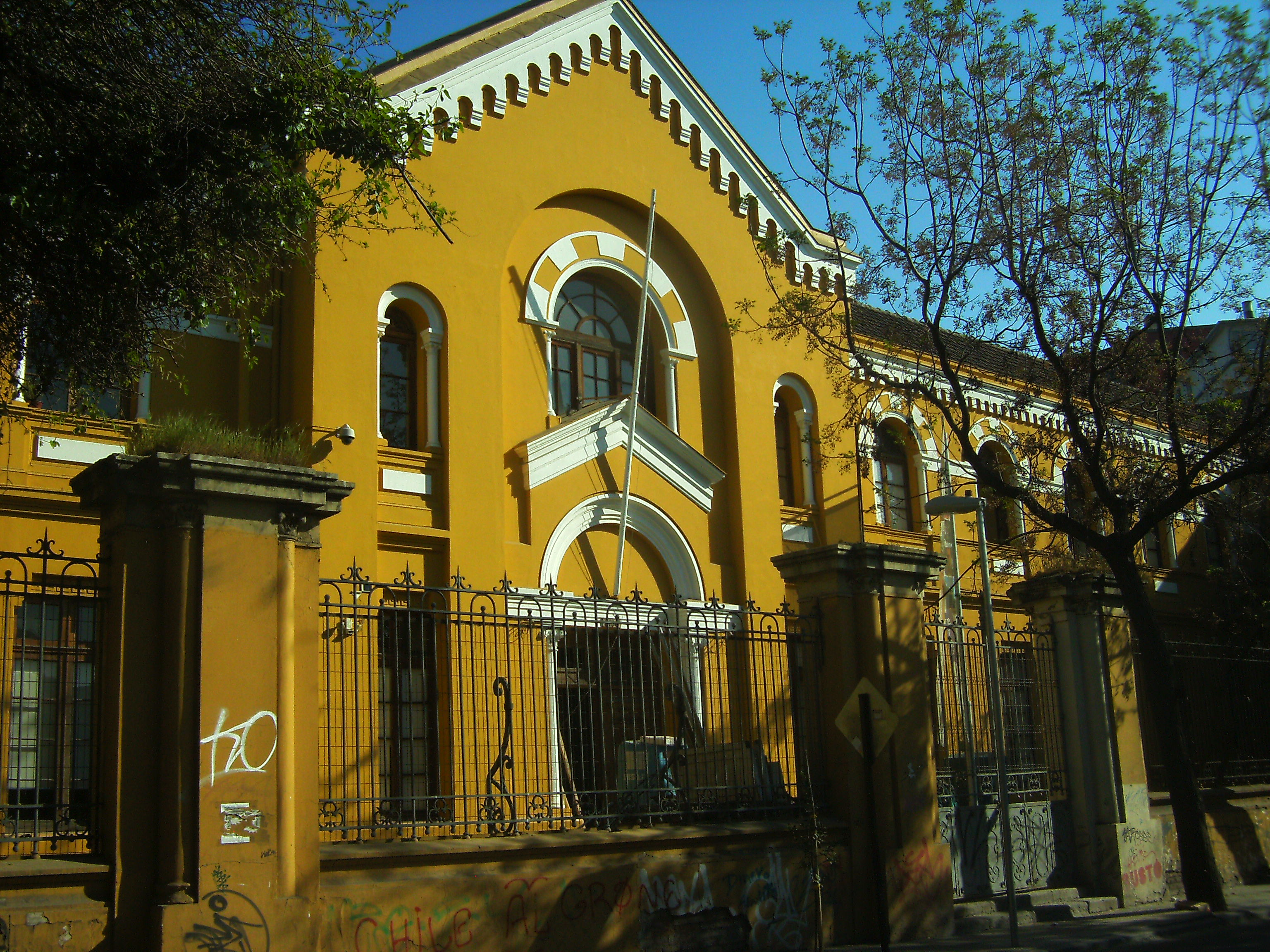 Sede de la ex- Escuela Normal Nº 1 This is a photo of a national monument in Chile: 839